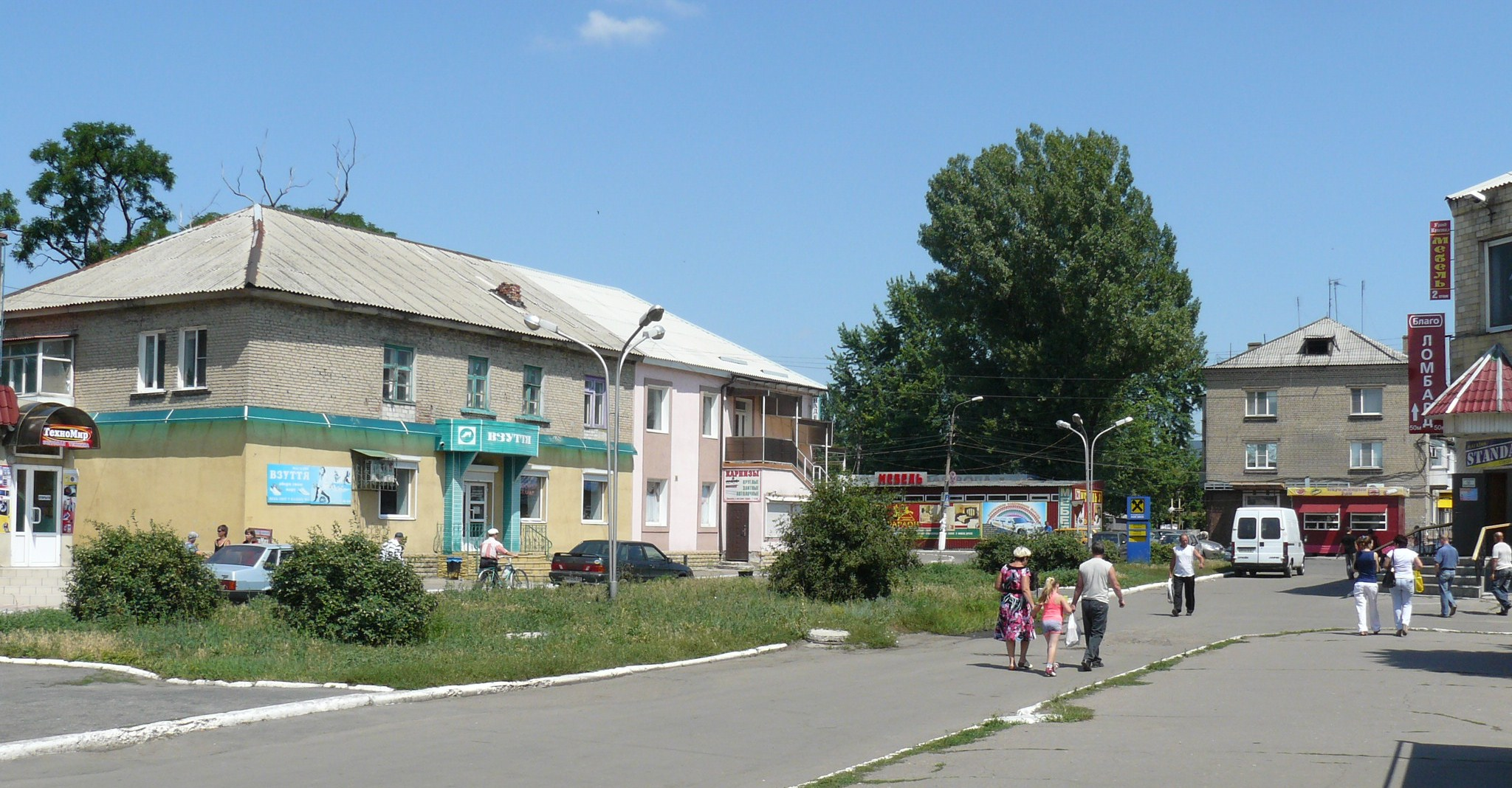 Krasnoarmijsk, centrum miasta.